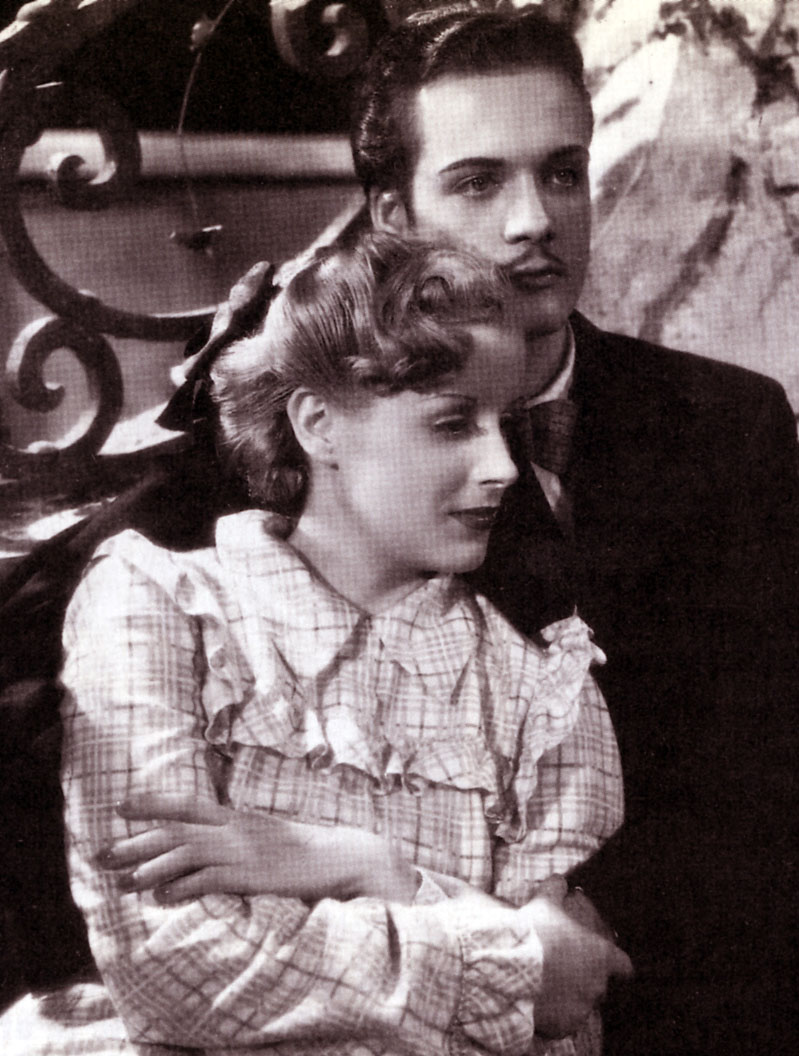 Maria Mercader e Giuseppe Rinaldi in Il prigioniero di Santa Cruz (film, 1940) di Carlo Ludovico Bragaglia